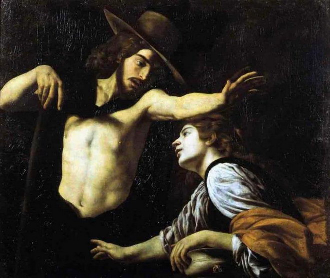 Картина Не торкайся мене роботи Баттістелло Караччоло